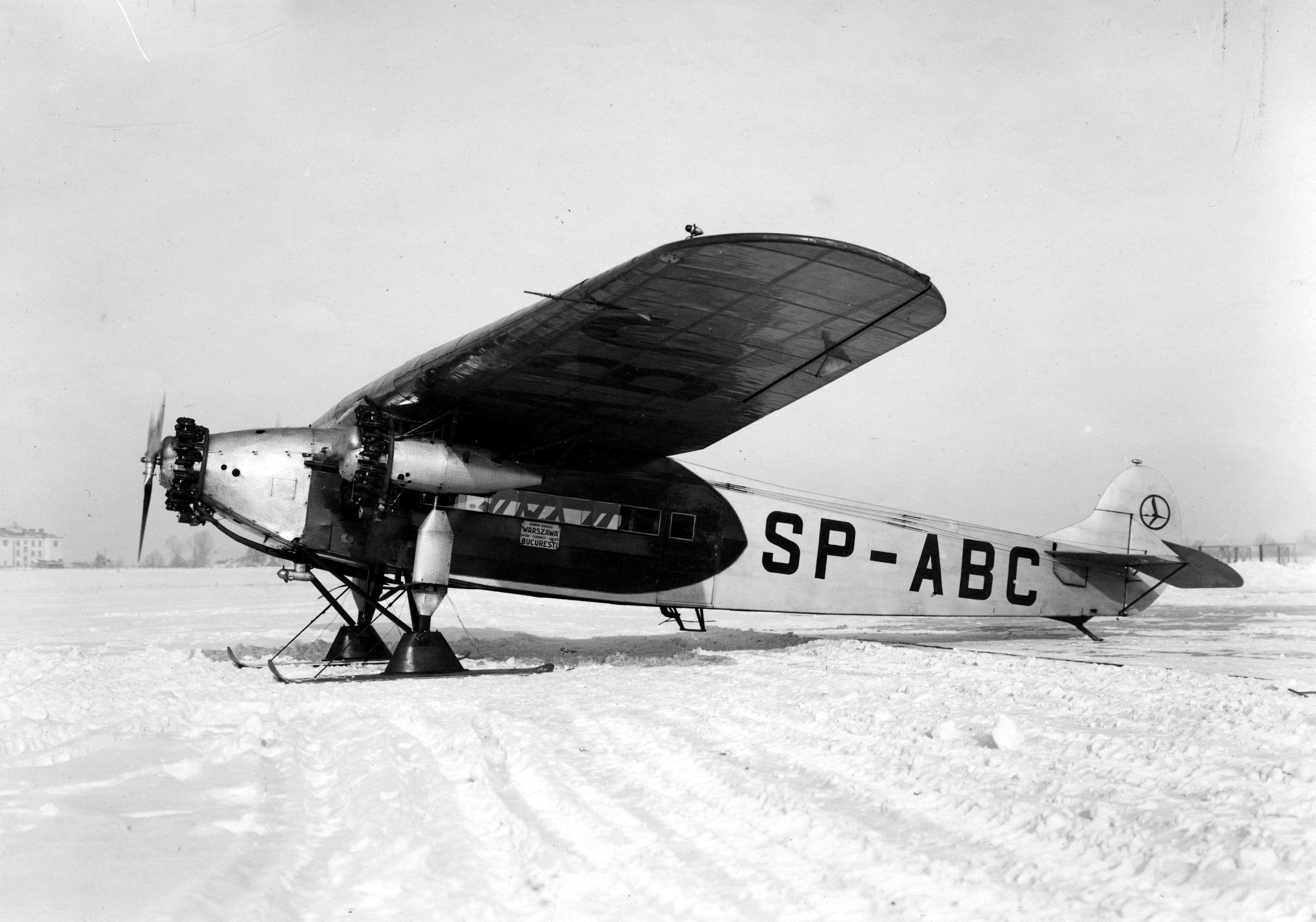 Samolot PLL LOT Fokker F.VII znak SP-ABC.